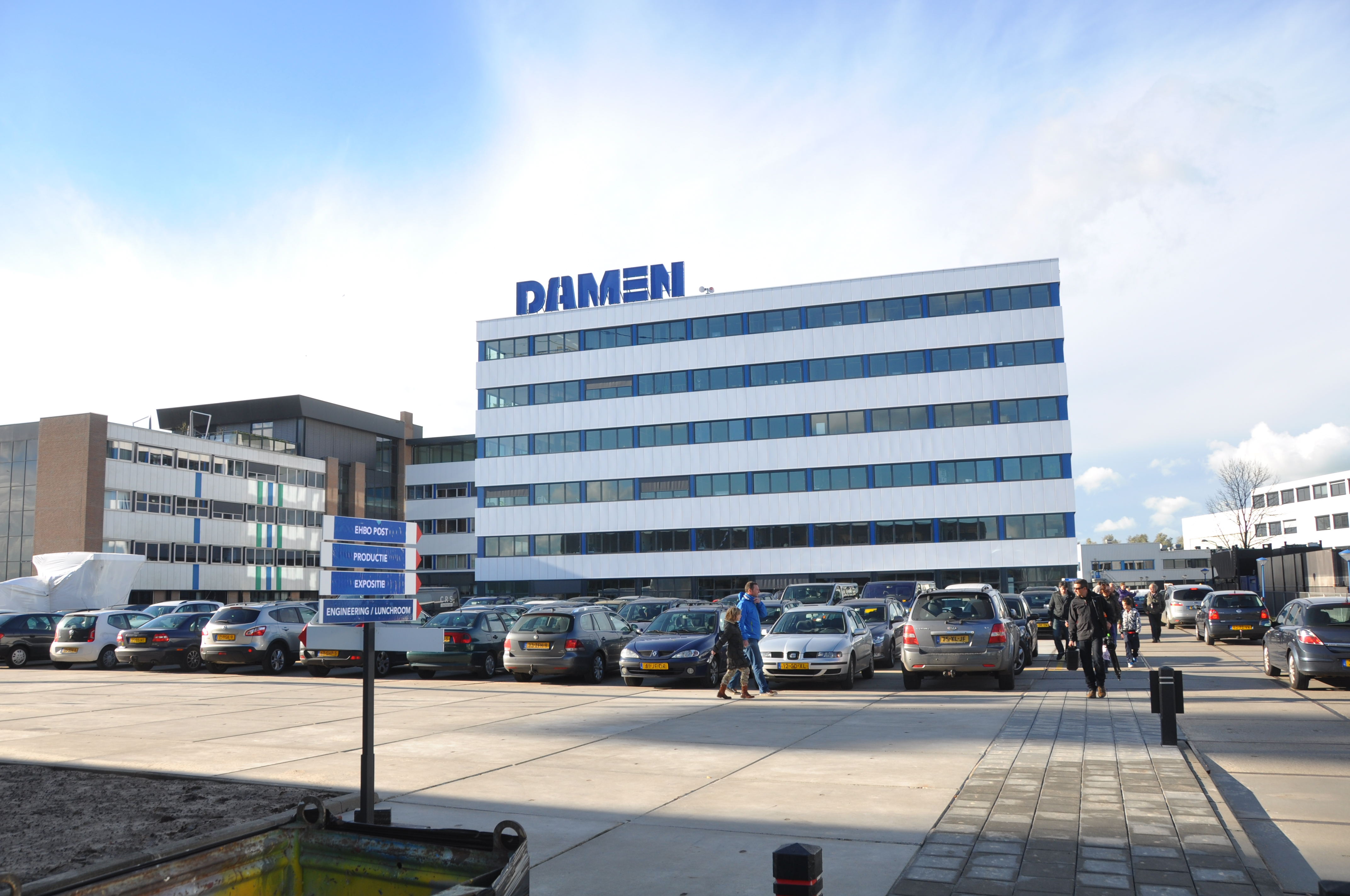 De open dag van Damen Gorinchem op 09-11-2013.